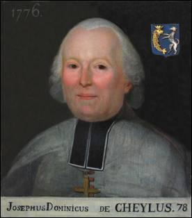 Joseph-Dominique de Cheylus (1717 ou 1719-1797), évêque de Tréguier, de Cahors et de Bayeux.